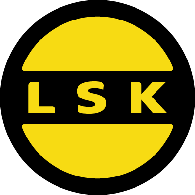 logo of Lillestrøm S.K.